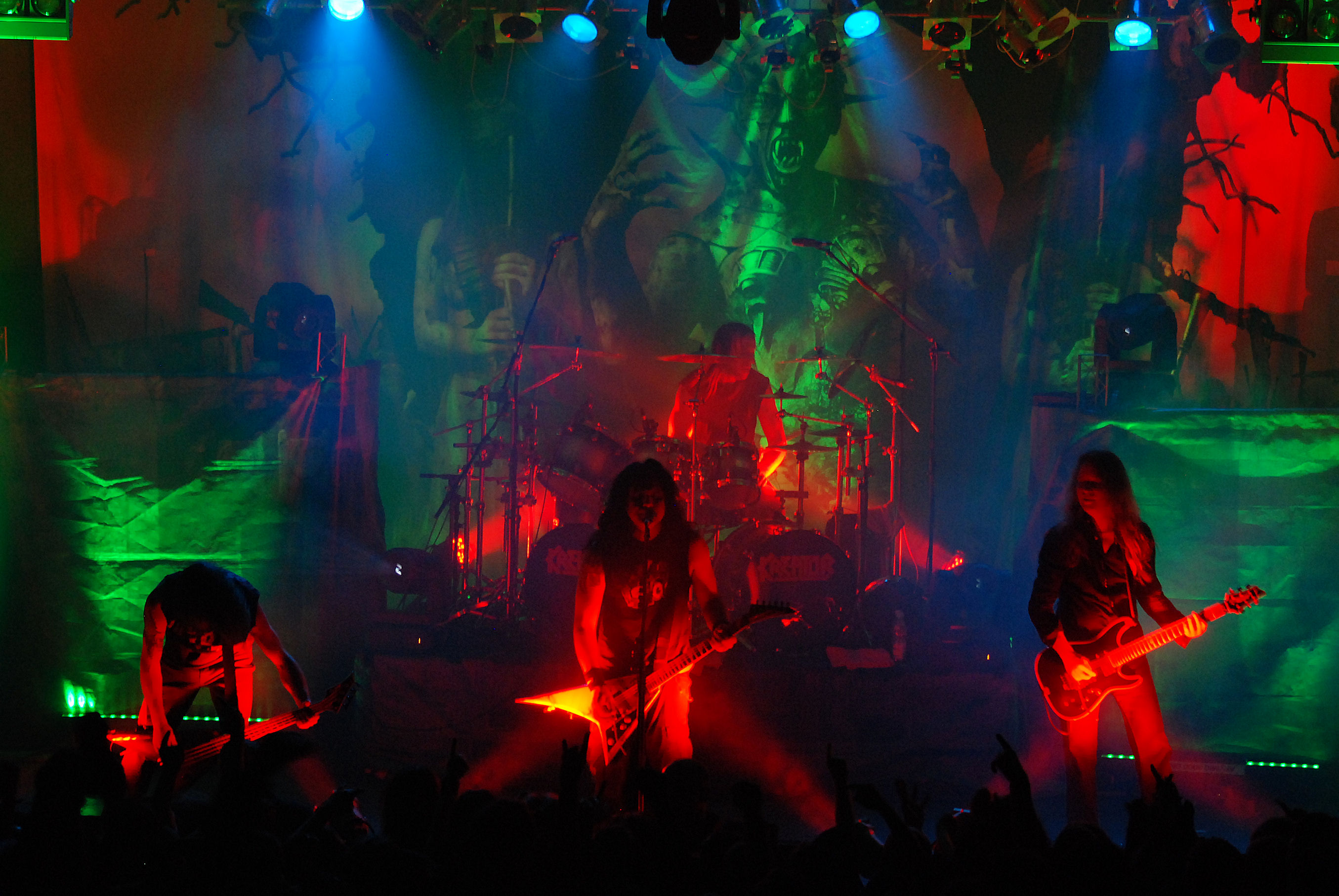 Kreator podczas koncertu w Klubie Studio w Krakowie